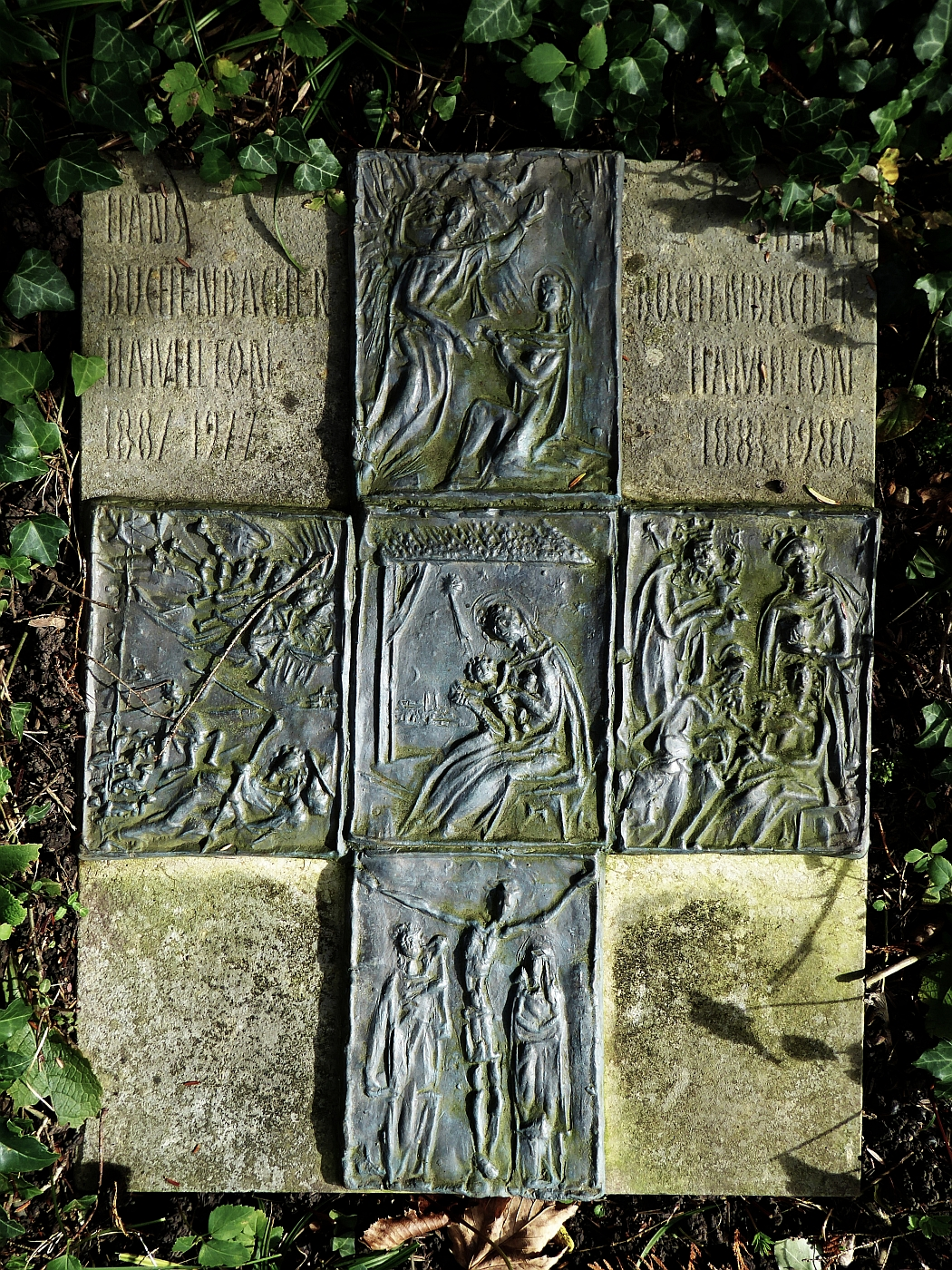 Hans Büchenbacher-Hamilton (1887–1977) Philosoph und Anthroposoph, Grab auf dem Friedhof Bromhübel in Arlesheim, Basel-Land